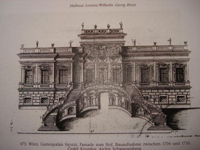 Gartenpalais Strozzi, Bauaufnahme 1704-1716. Fotoerlaubnis von Institut für Höhere Studien.